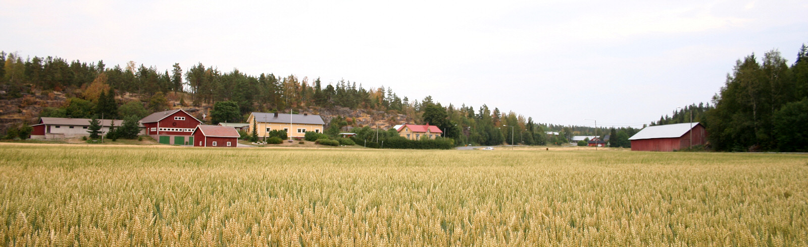 Village of Sorkka, in Rauma, Finland